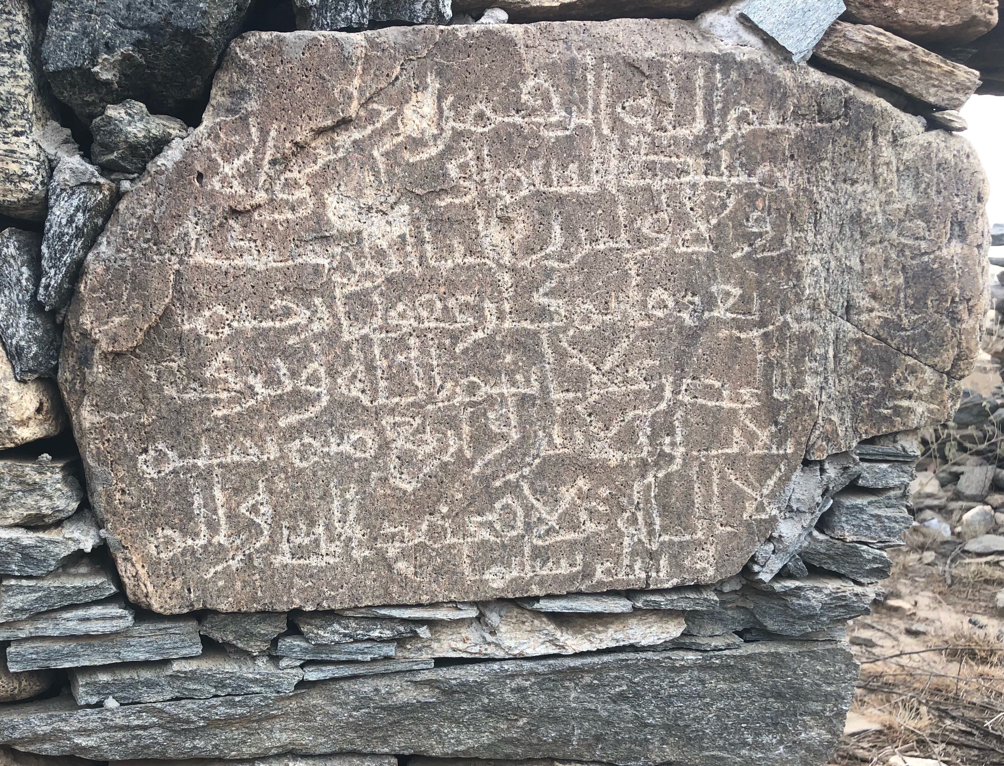 Lingua Franca Nova: نقش حصن شهران المؤرخ سنة ٤٣٣ هجري ، وكتب بالخط الكوفي وهو غير المنقط.